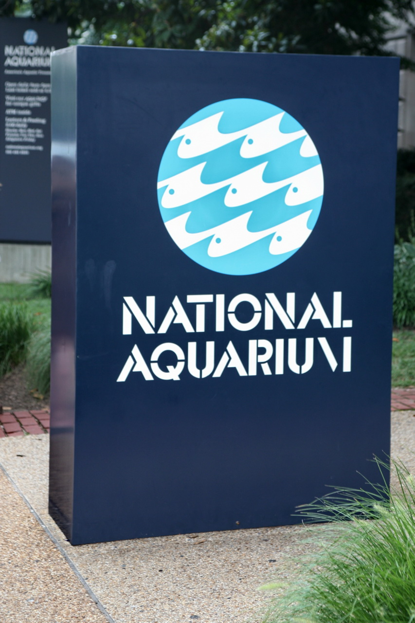 National Aquarium